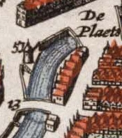 uitsnede uit een stadsplattegrond van Utrecht (Atlas van Loon, 1649) met "Snippenvlucht", Ganzenmarkt, Oudegracht, Bezembrug, Stadhuisbrug, stadhuisgebouwen (oa Keyzerrijk als waaggebouw), en de Stadskraan.